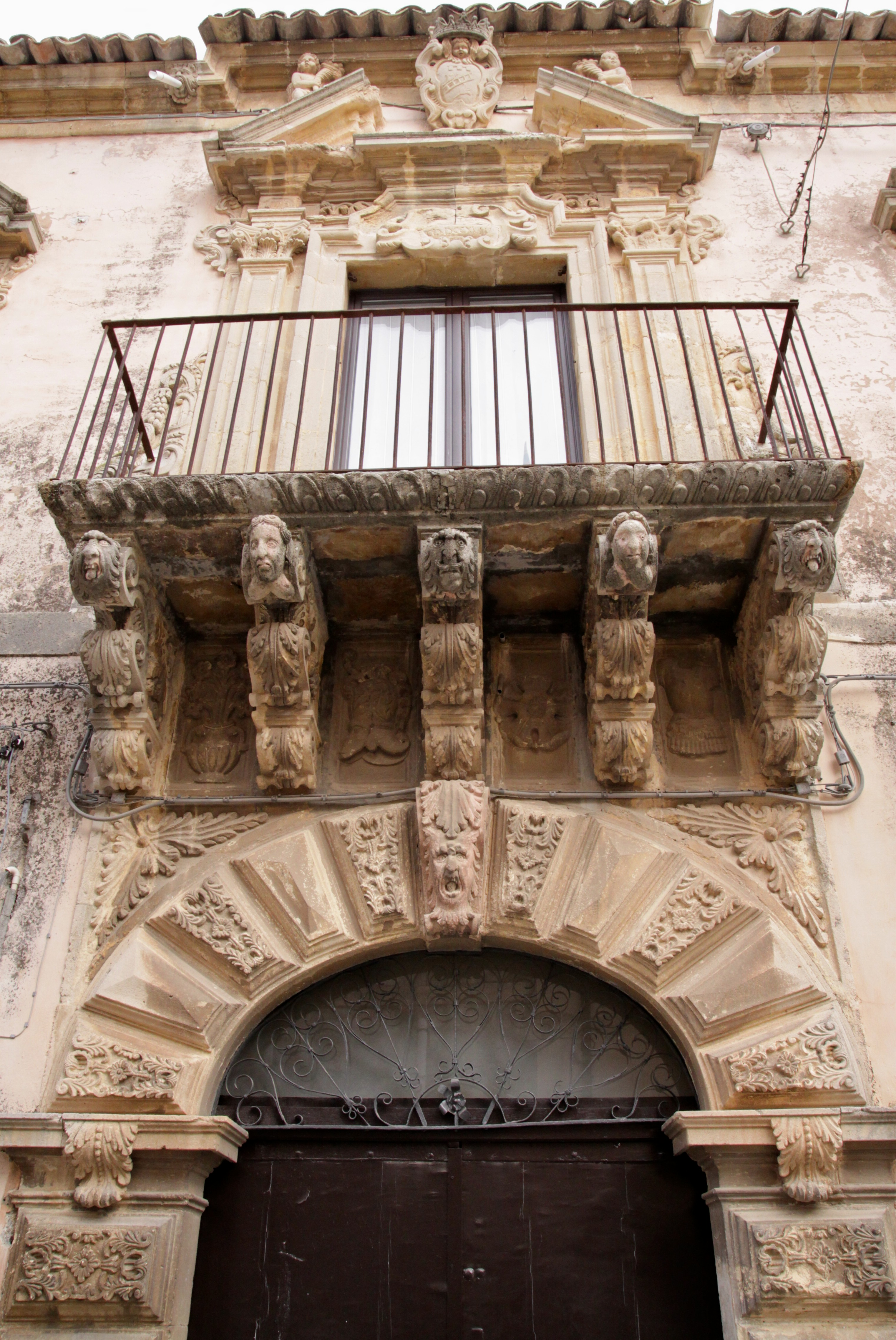 Militello (CT). Palazzo Iatrini (inizi sec. XVIII) in largo Iatrini.